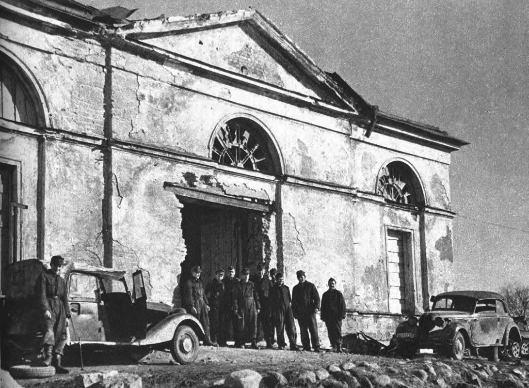 Кирха прихода Ропсу в деревне Малые Горки.